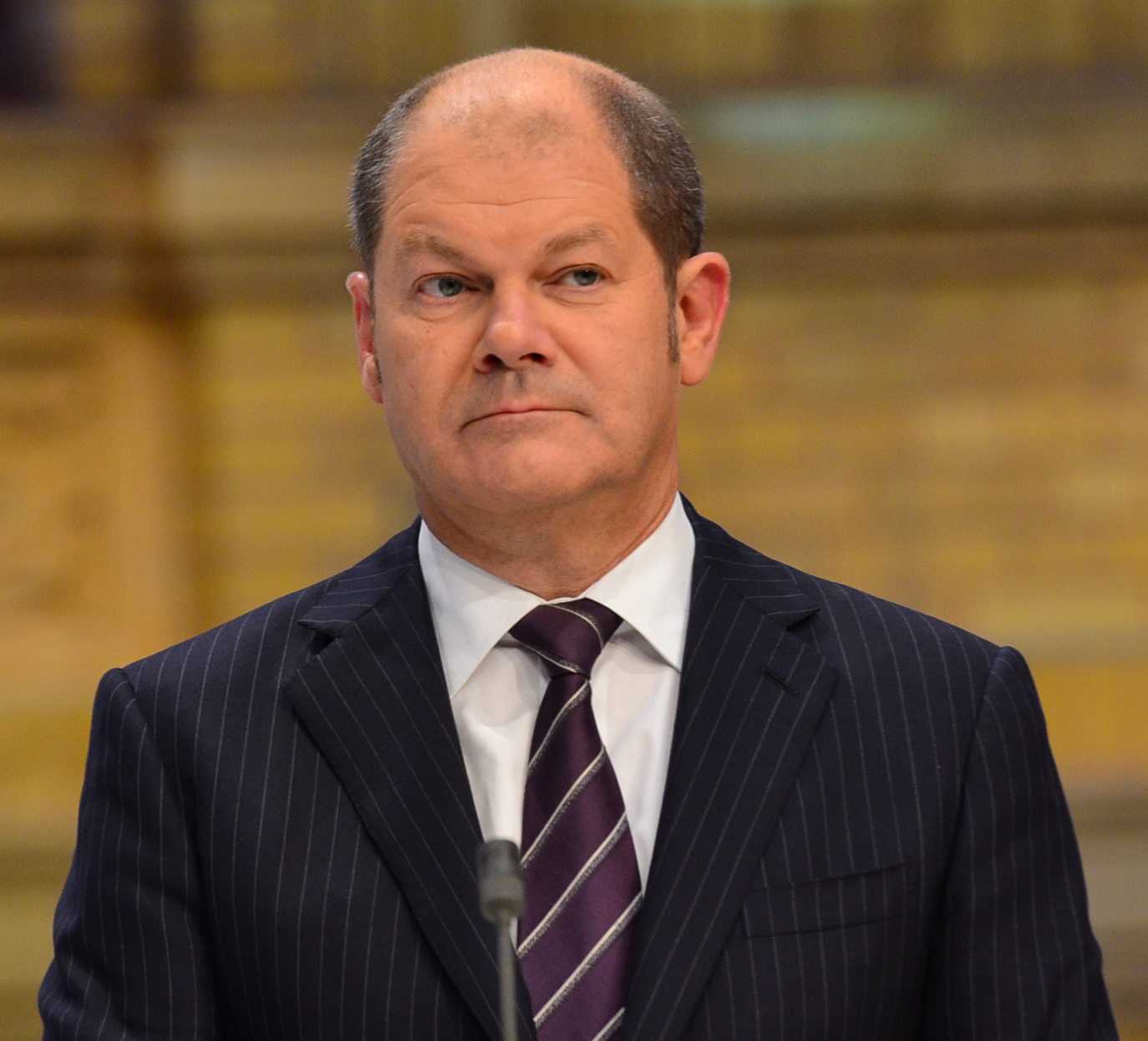 Olaf Scholz - WP:Fotoprojekt zur Bundestagswahl 2013 in Berlin in den Parteizentralen und dem ZDF